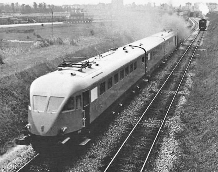 Un treno ETR.200; trasferimento a vapore lungo la cintura di Milano.